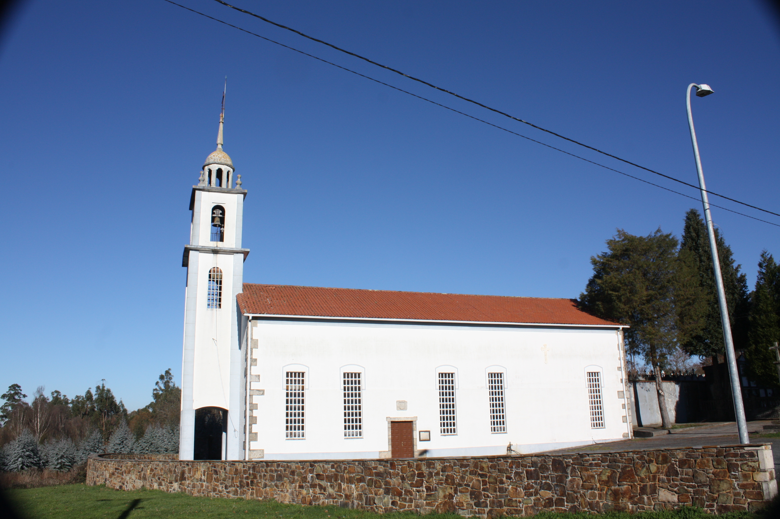 Igrexa de Santiago de Boimorto (A Coruña)